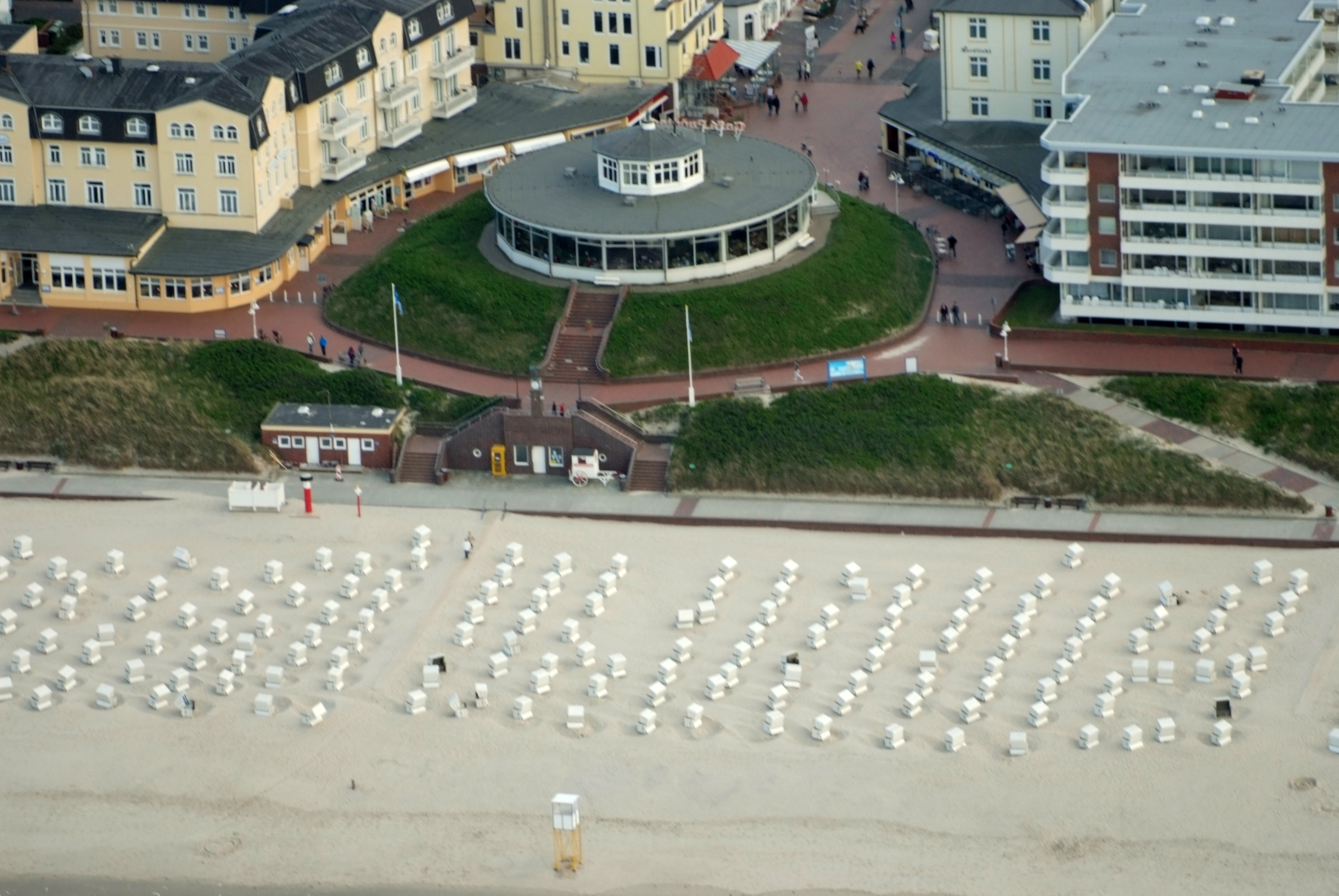 Fotoflug vom Flugplatz Nordholz-Spieka über Bremerhaven, Wilhelmshaven und die Ostfriesischen Inseln bis Borkum Wangerooge Dorf: Café Pudding